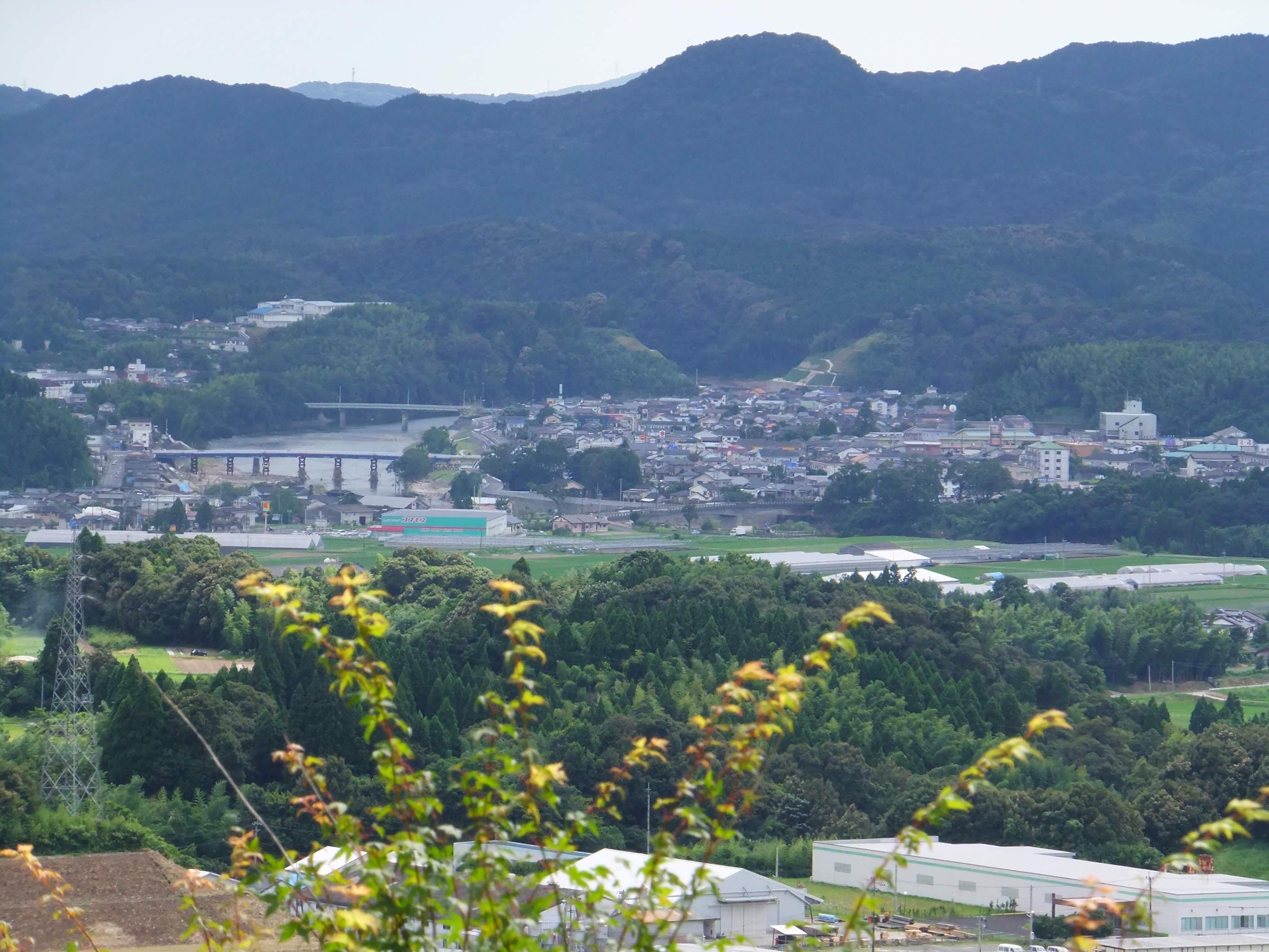 さつま町市街地